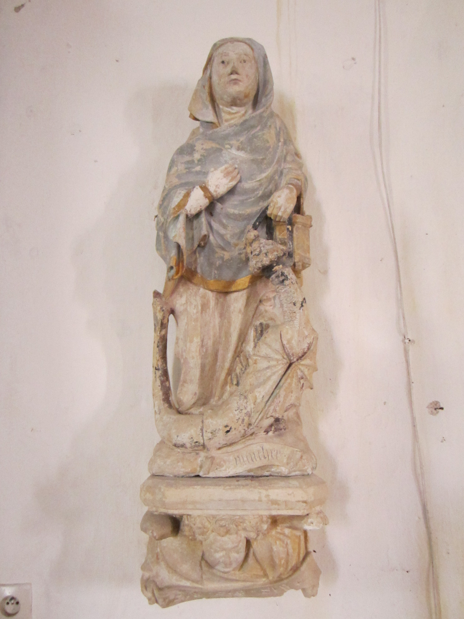 Église Saint-Germain-le-Gaillard (Manche)